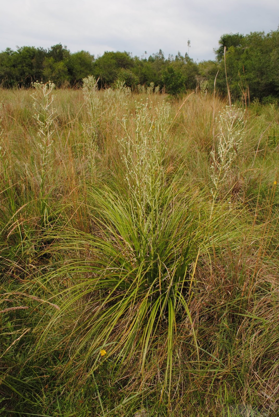 Eryngium stenophyllum. Apiaceae. Fotos tomadas en pajonal al margen de la Cañada del Sauce en la base del Cerro Buena Vista, departamento de Rivera. Uruguay. Foto compartida en por Andrés González.